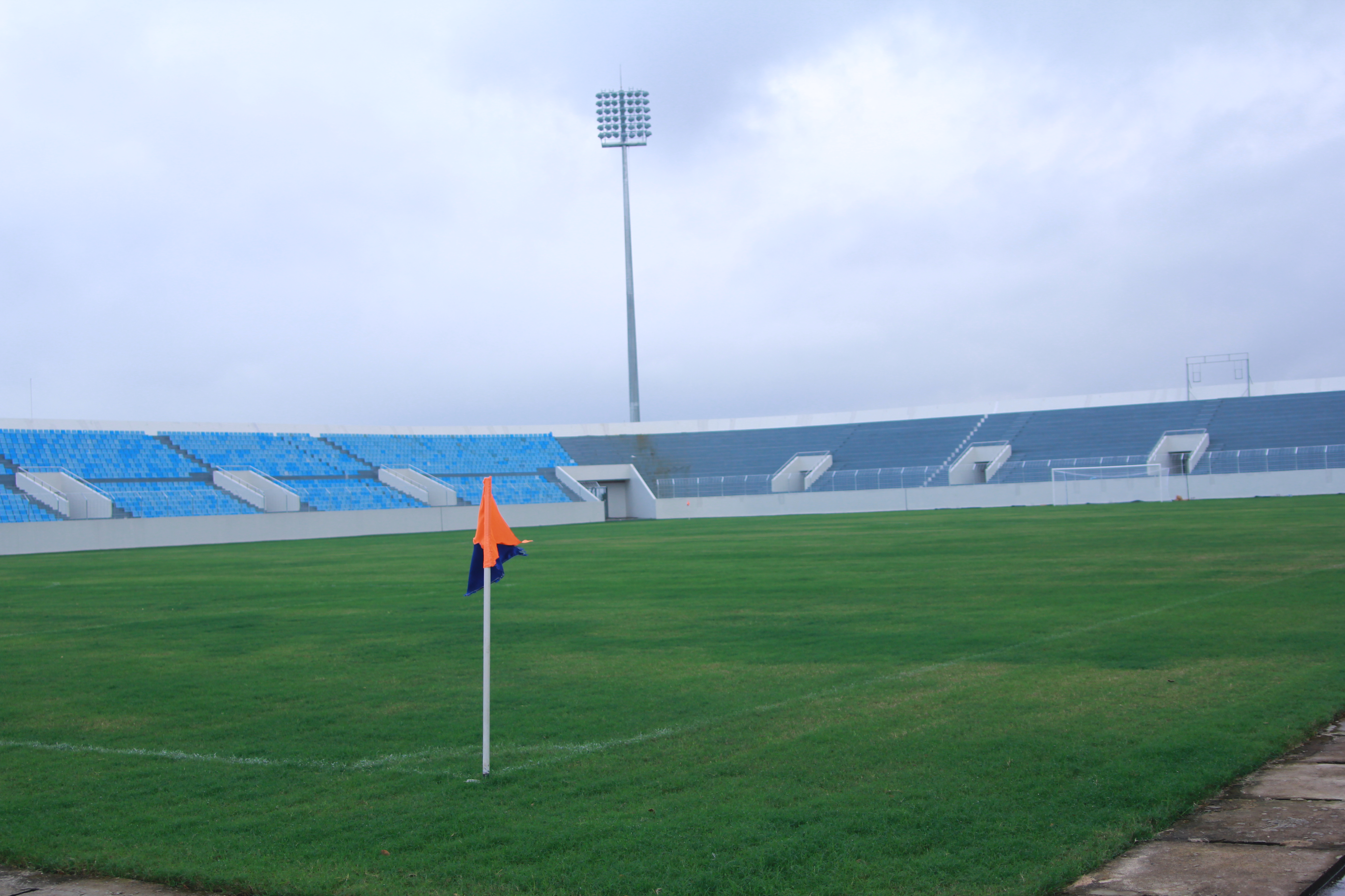 Hoa xuan stadium